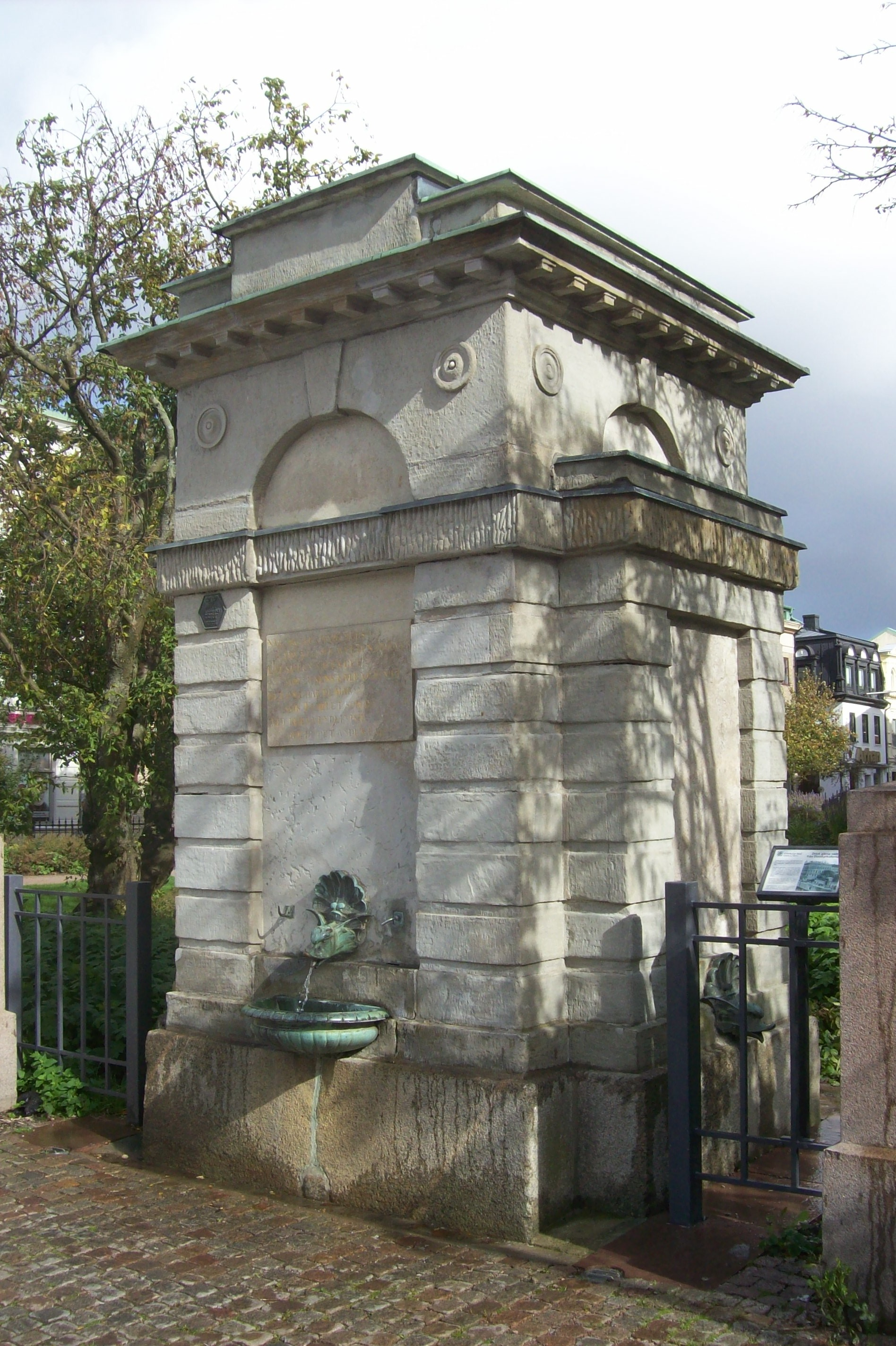 Göteborg Inom Vallgraven 65:1 (f.d. Domkyrkan 1), Domkyrkobrunnen.